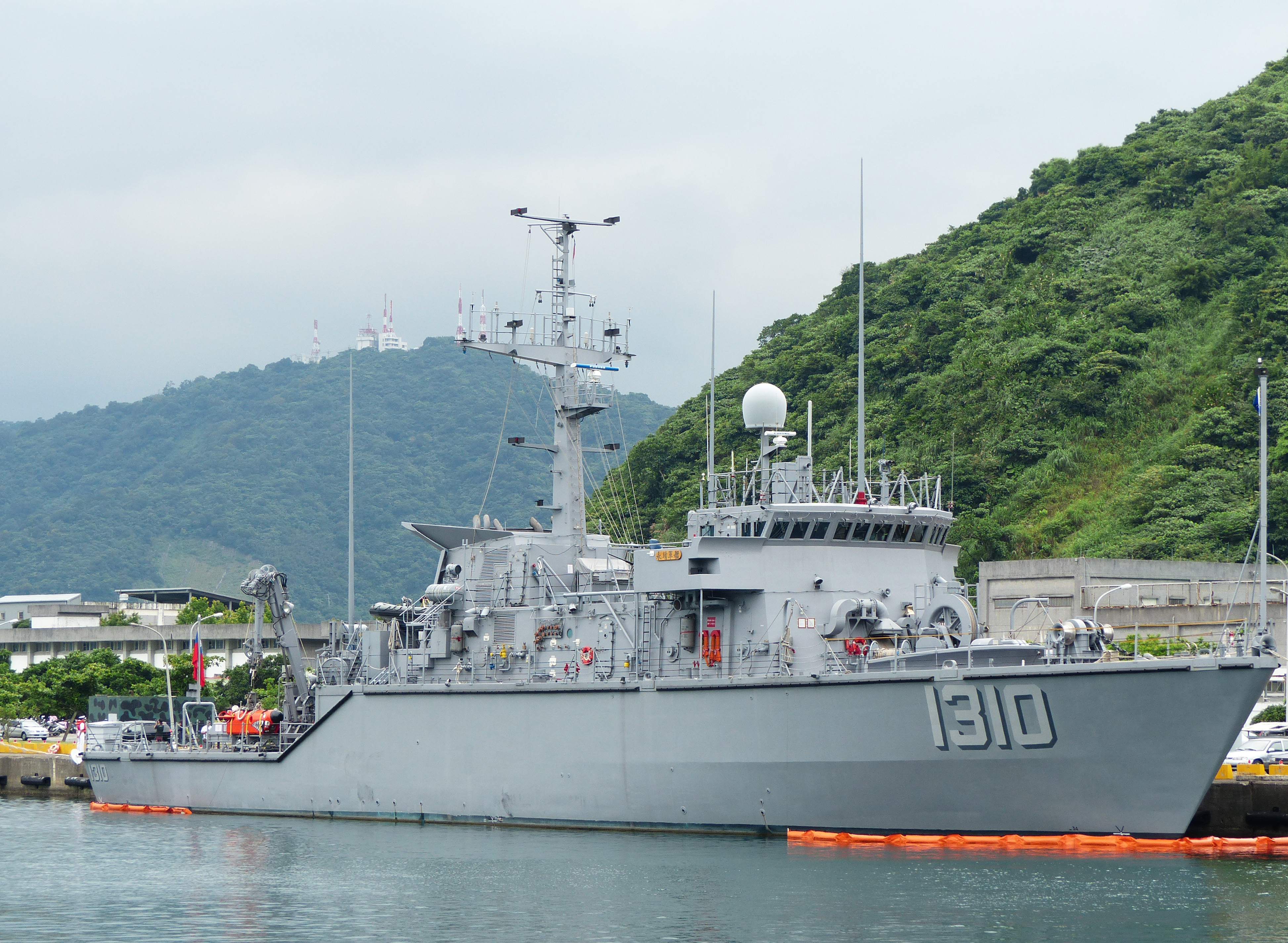 停泊中正軍港9號碼頭的永靖級獵雷艦永靖（MHC-1310）。